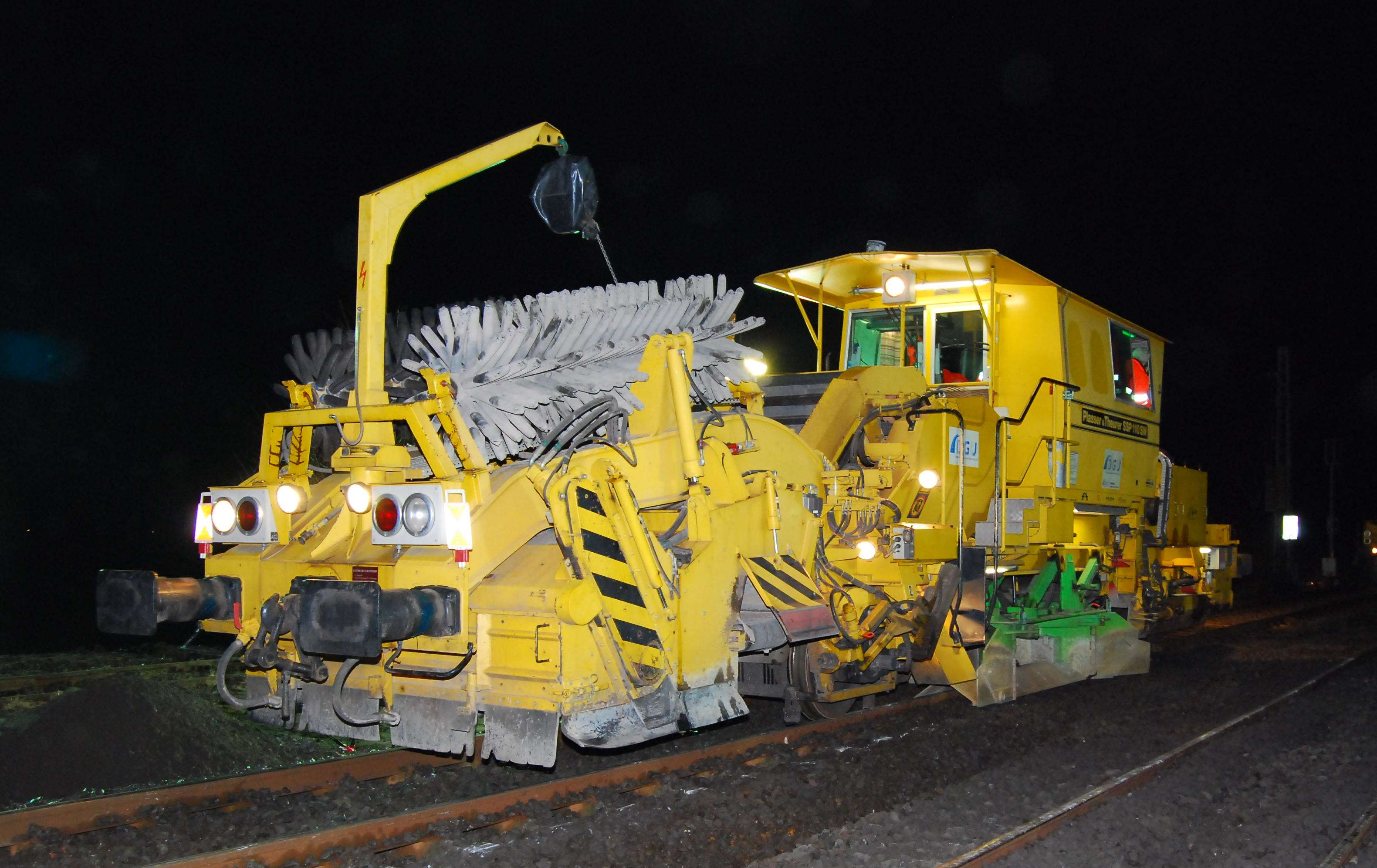 Gleisbettbearbeitungsmaschine